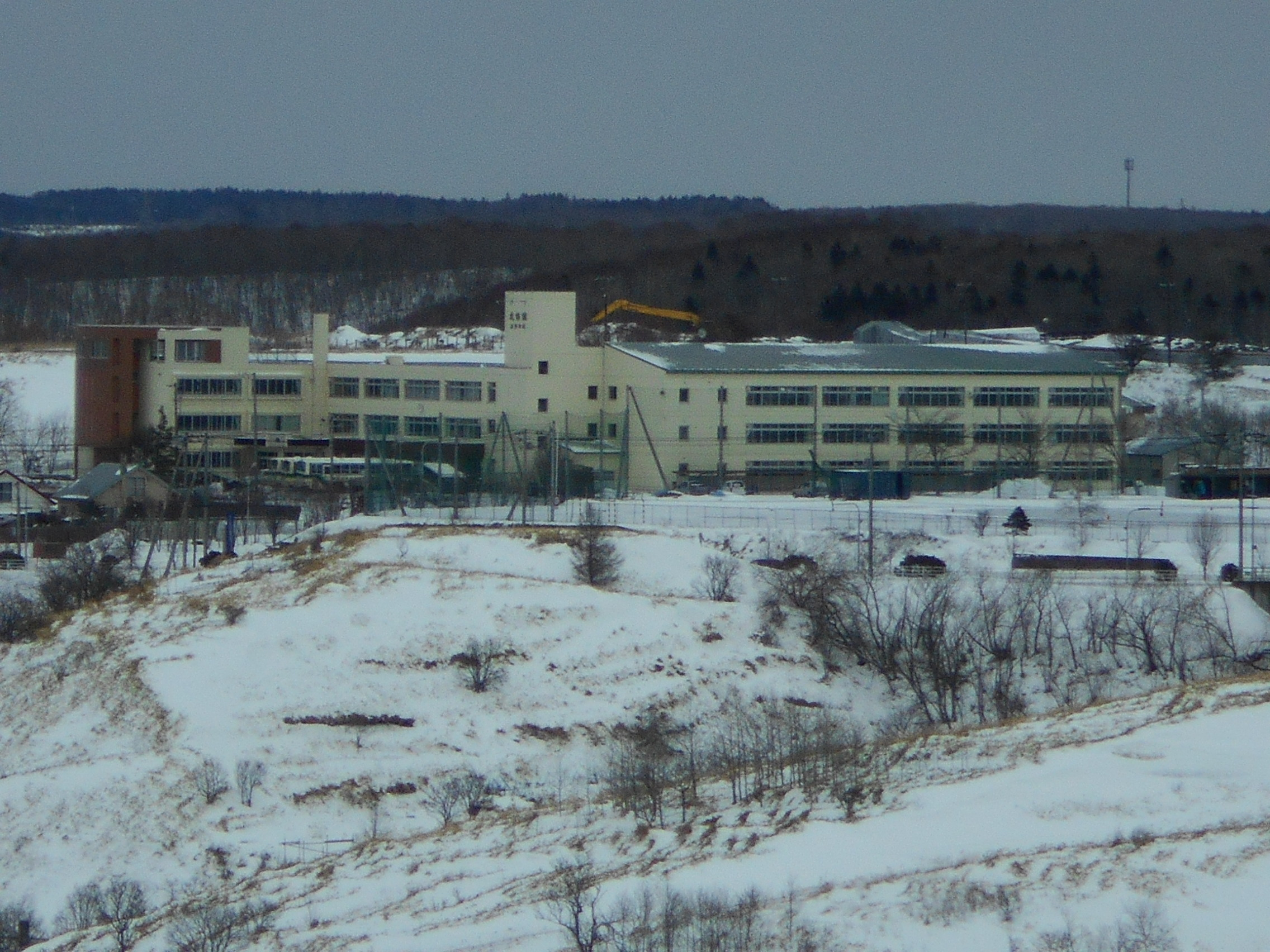 武修館中学校・高等学校